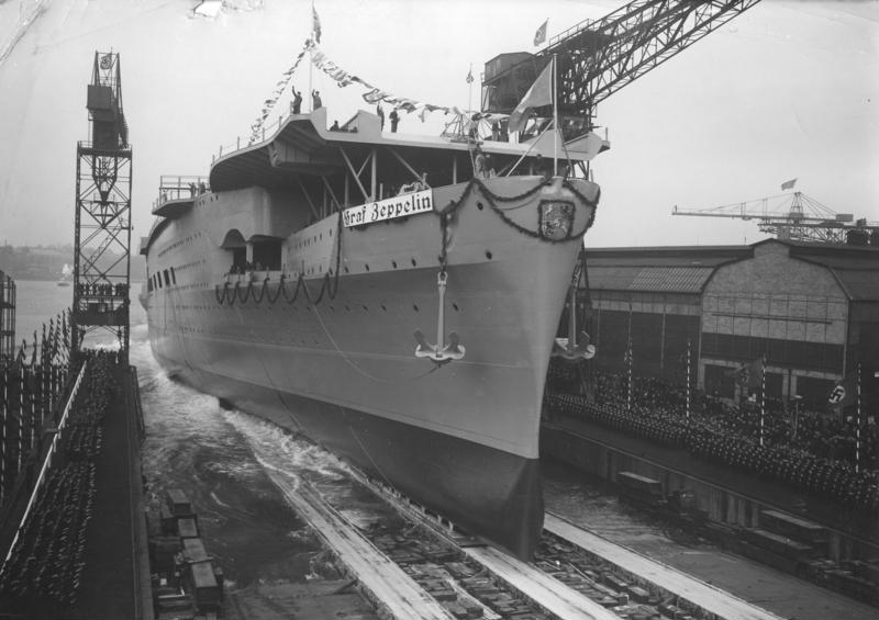 Flugzeugträger "Graf Zeppelin" Stapellauf 8.12.1938 Deutsche Werke Kiel Platte Nr. 17395